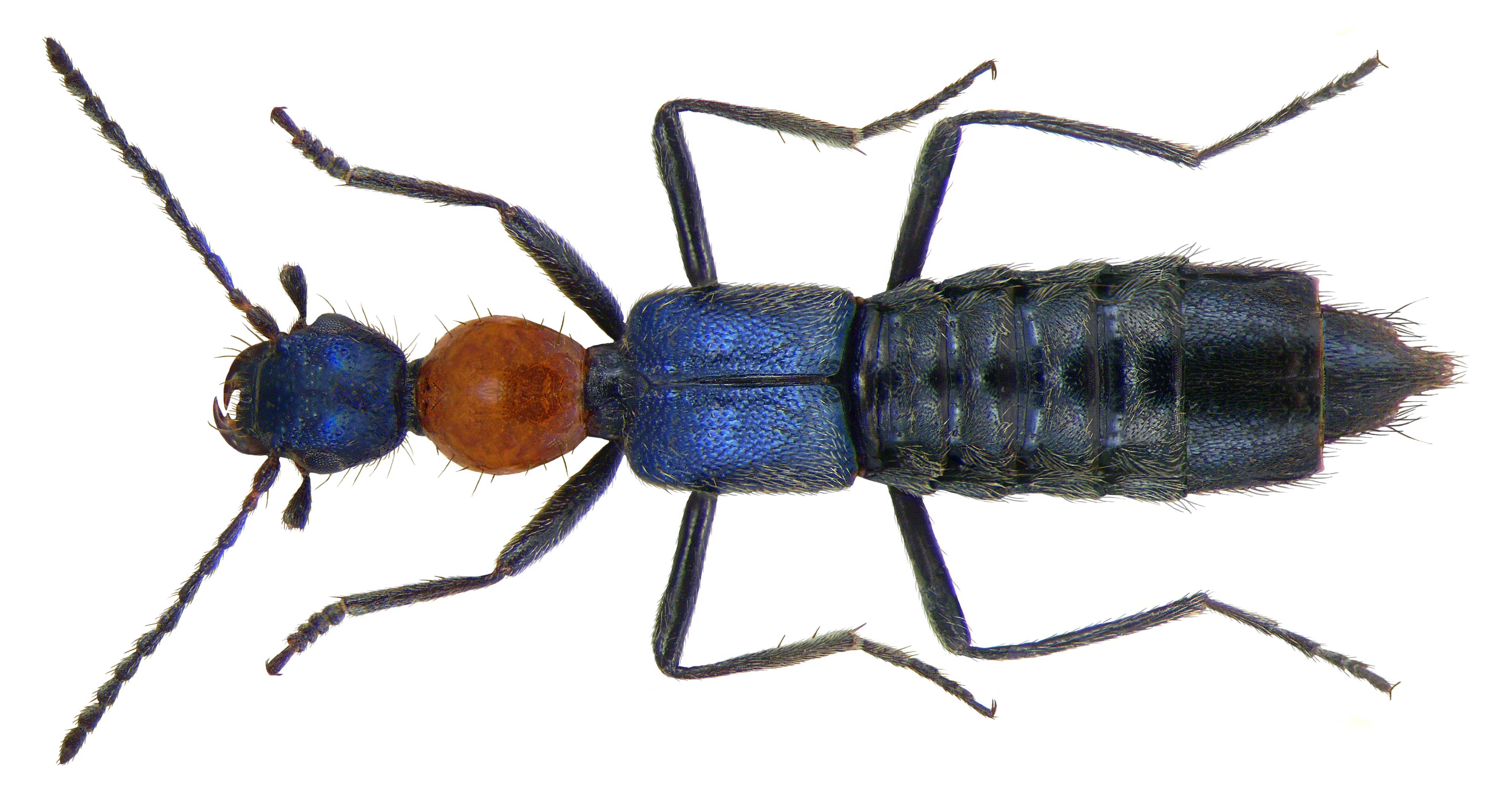 Familie: Staphylinidae Grösse: 6,5-8,0 mm Verbreitung: Europa Ökologie: an sandigen Ufern, gern gesellig Fundort: Italien, Südtirol, Bruneck, Rienz-Ufer leg.det. U.Schmidt, 1972 Foto: U.Schmidt, 2009